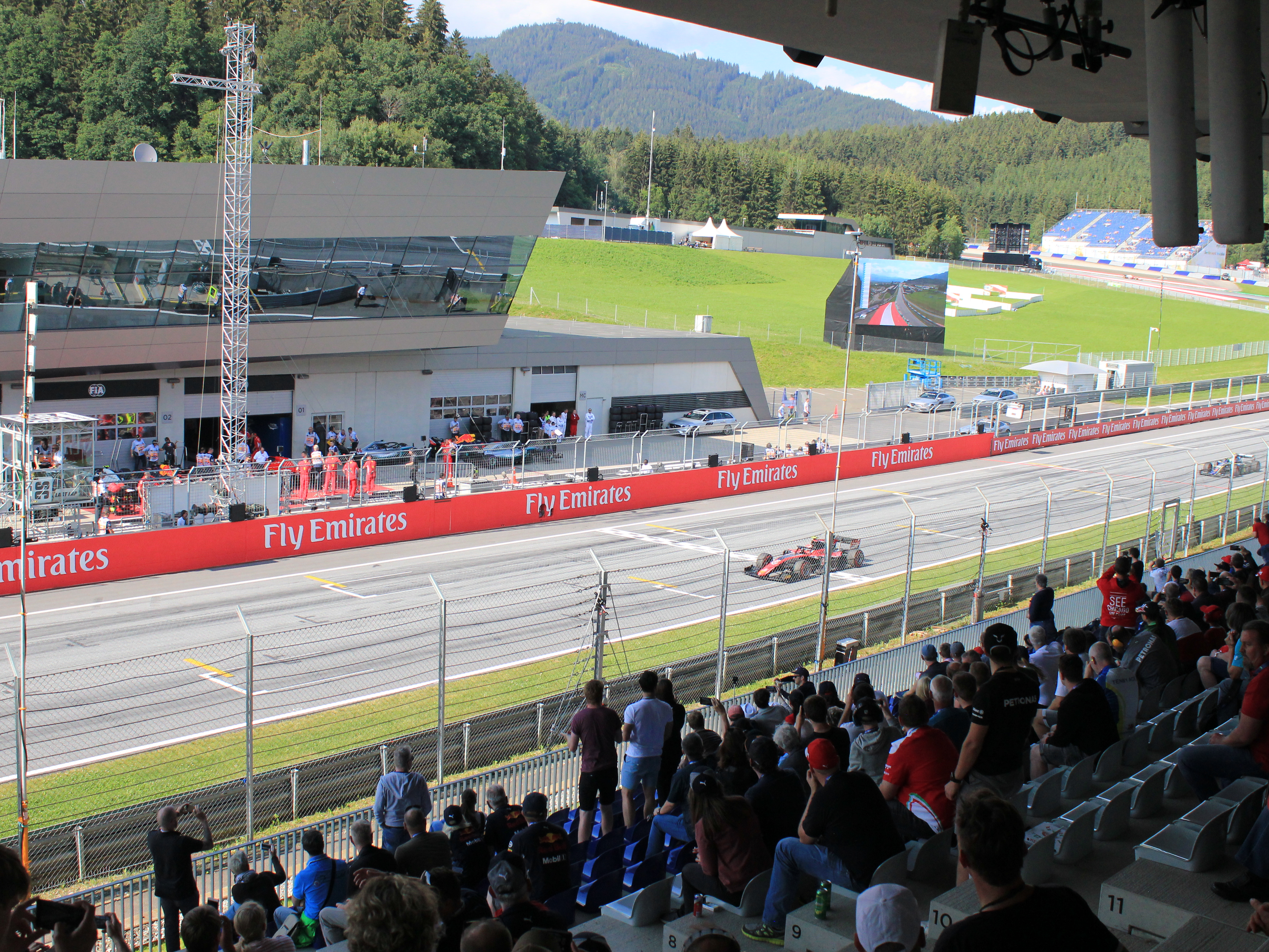 Rennfreigabe mit Russell an der Spitze nachdem das Rennen rollend freigegeben wurde